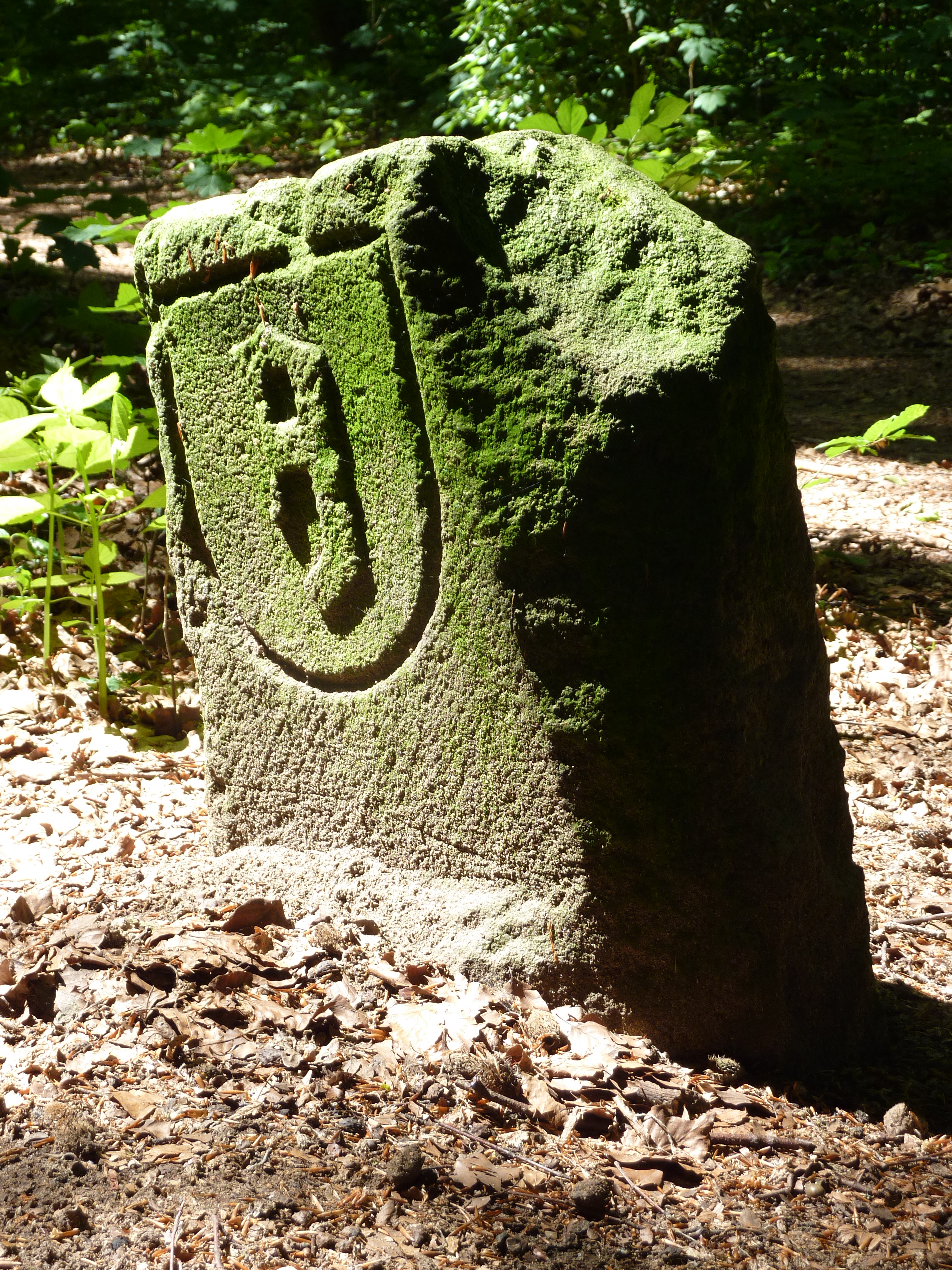 Der Schäfersteinpfad ist ein historischer Grenzweg aus dem 15. Jahrhundert in der Stadt Frankfurt am Main. Der Pfad markierte seit dem Jahr 1448 die Grenze zweier als Viehweide genutzer bewaldeter Gebiete (Hutewald) im Frankfurter Stadtwald – die der Stadt Frankfurt und die der in Sachsenhausen ansässigen Kommende des Deutschen Ordens. Das Foto zeigt einen der Grenzsteine mit spiegelverkehrtem Buchstaben F als Symbol für Frankfurt